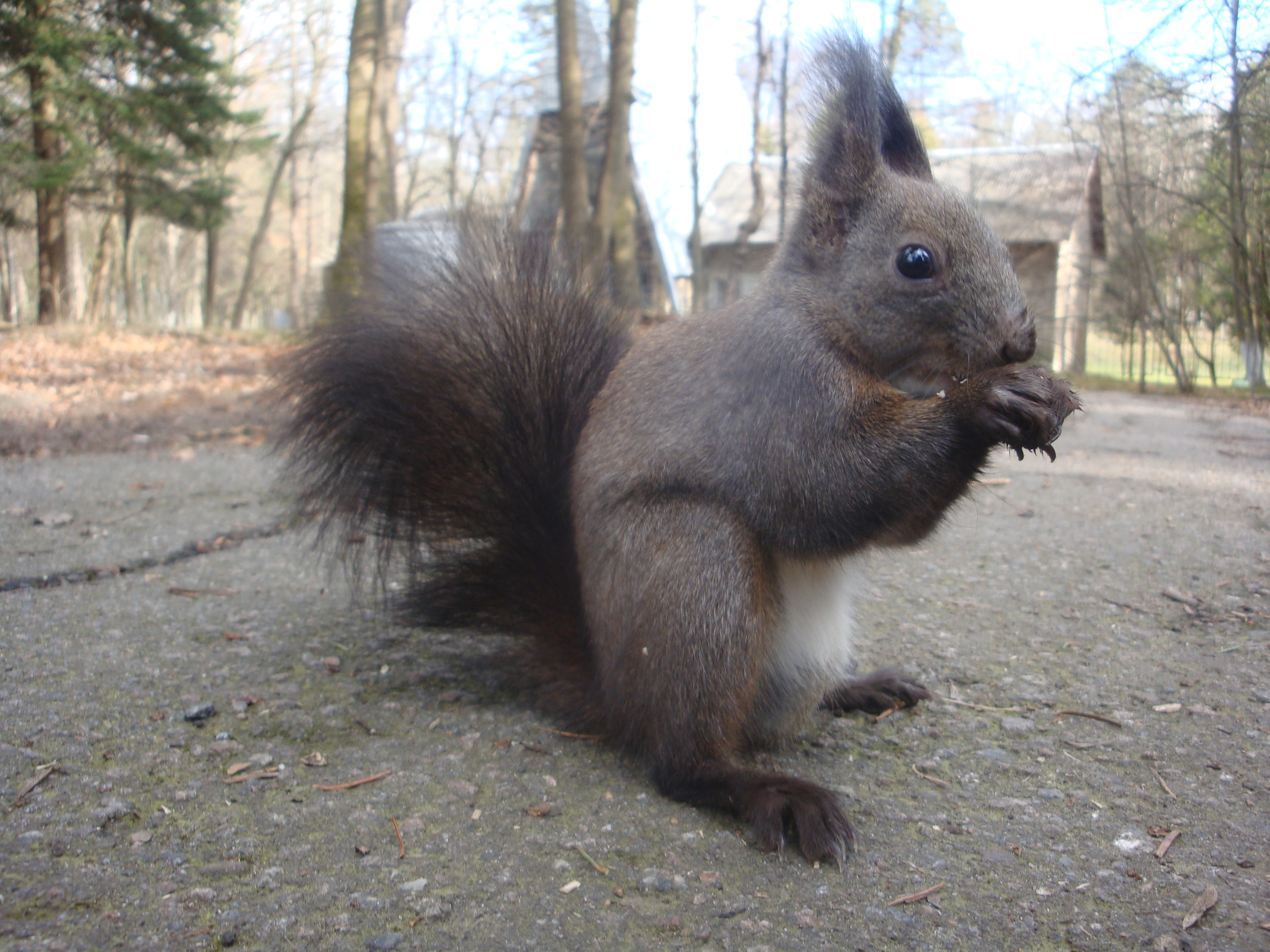 Обыкновенная белка разгрызает грецкий орех, Трускавец.